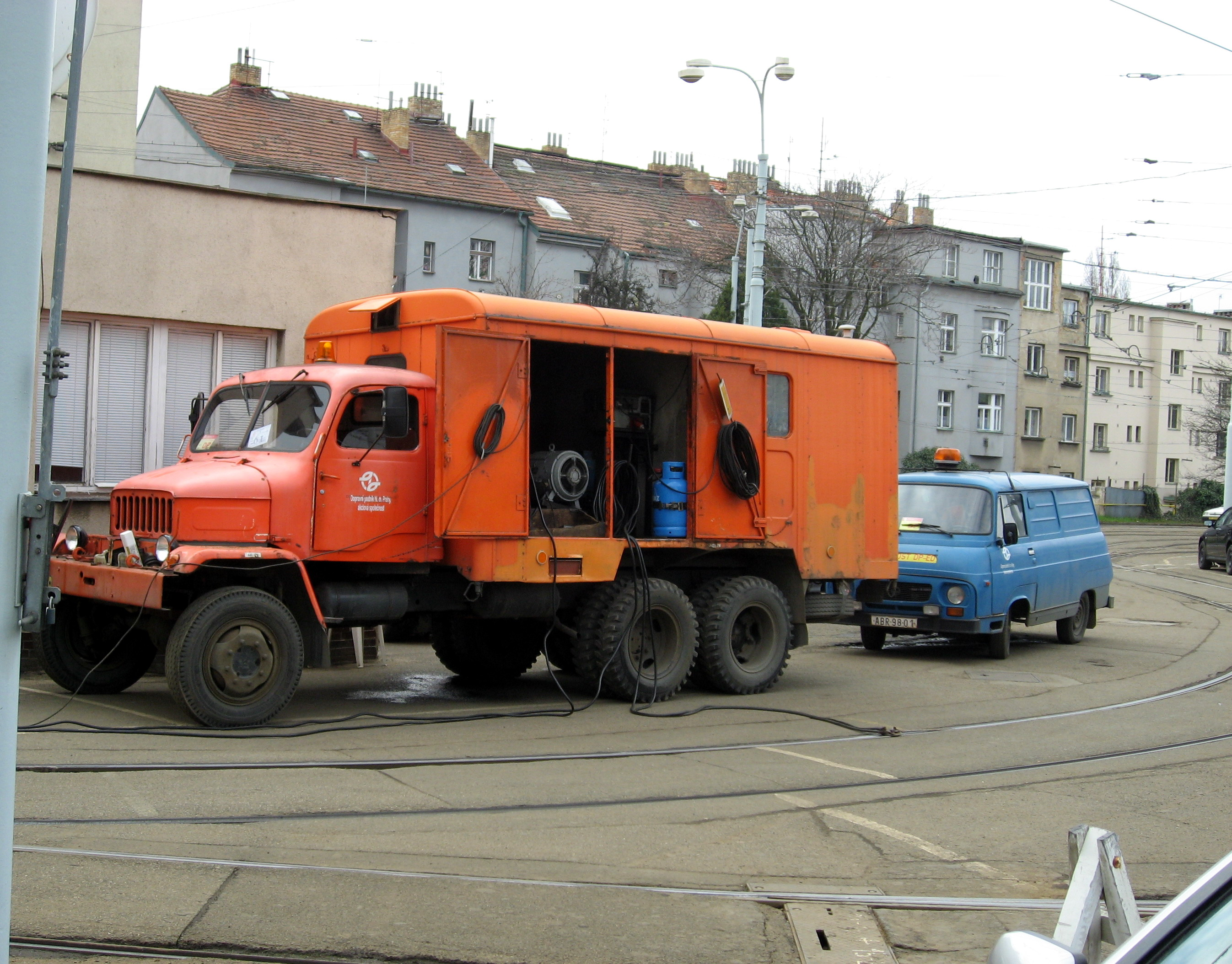 Vejtřeska u Vozovny Strašnice